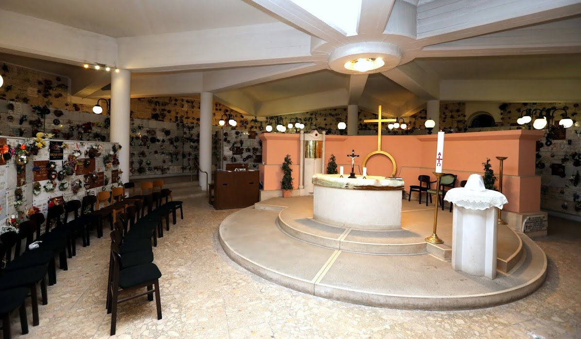 Altemplom